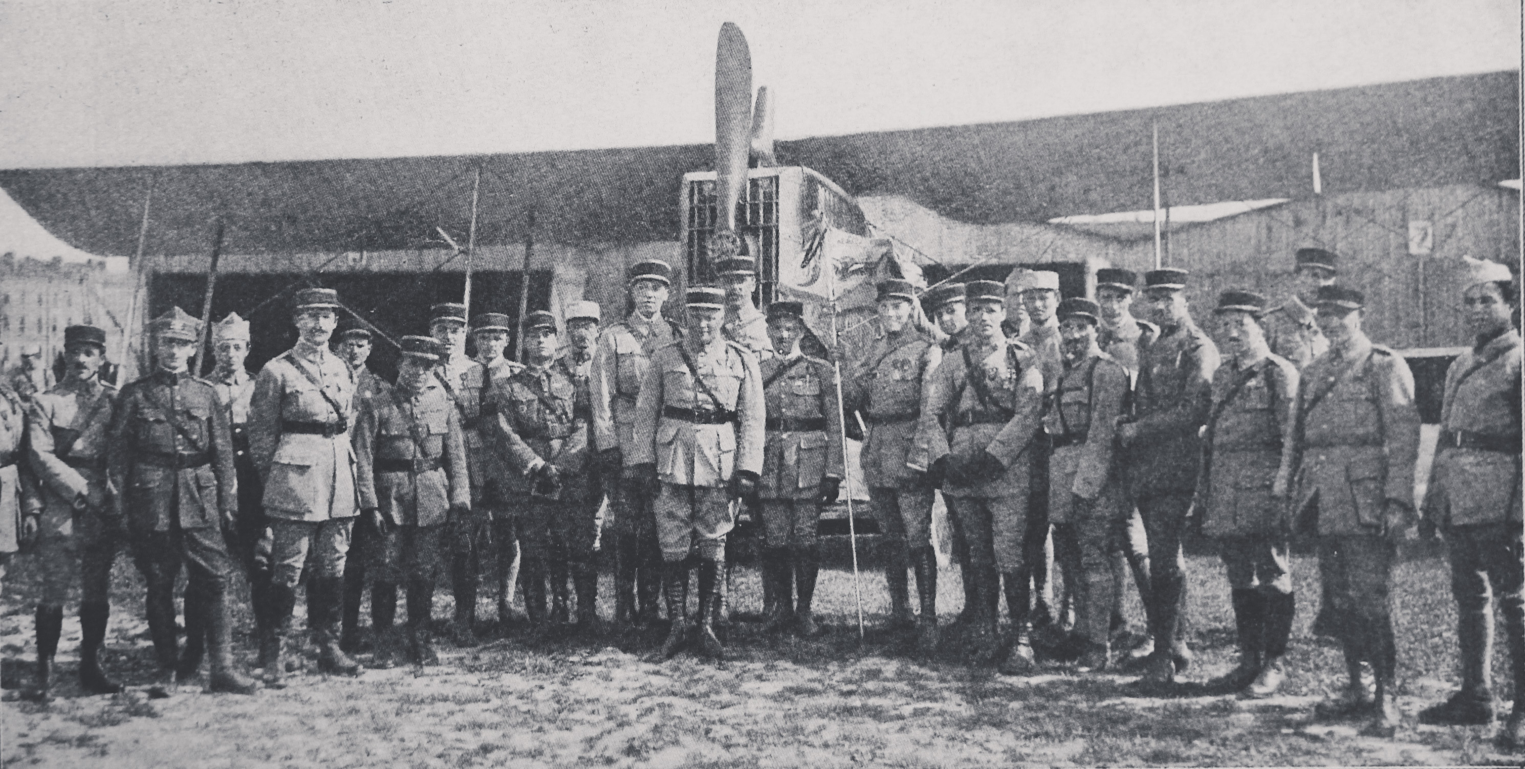 66 francuska eskadra bombardująca "Breguet B.2" na lotnisku mokotowskim w maju 1919 r.